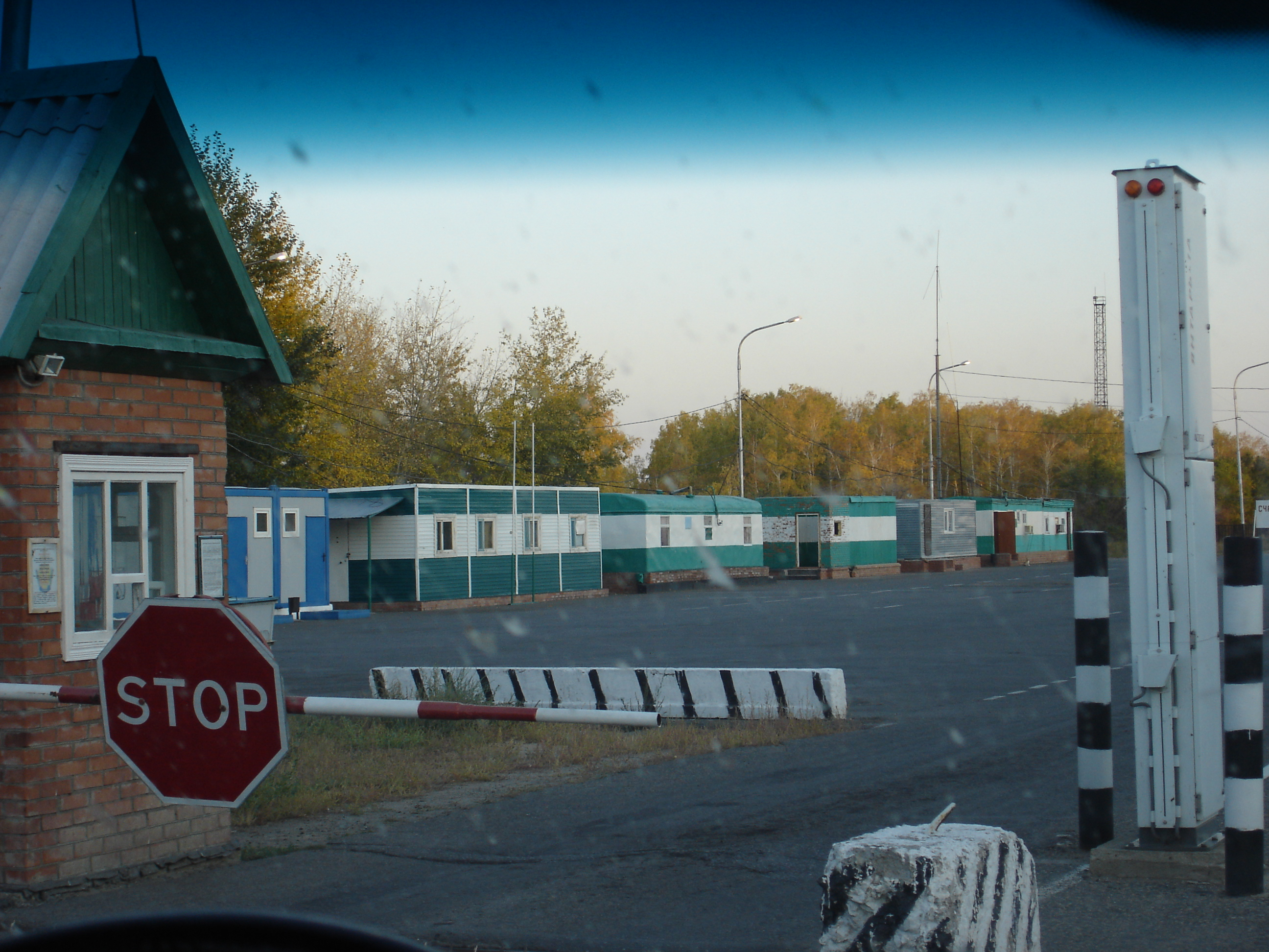 КПП Ольховка, российско-казахская граница.